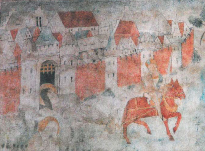 Беларуская (тарашкевіца): Полацак (Połacak), Запалоцьце (Zapałoćcie), касьцёл і кляштар бэрнардынаў. Фрагмэнт фрэскі «Цуд Сьвятога Юрыя» зь Віленскага касьцёла бэрнардынаў